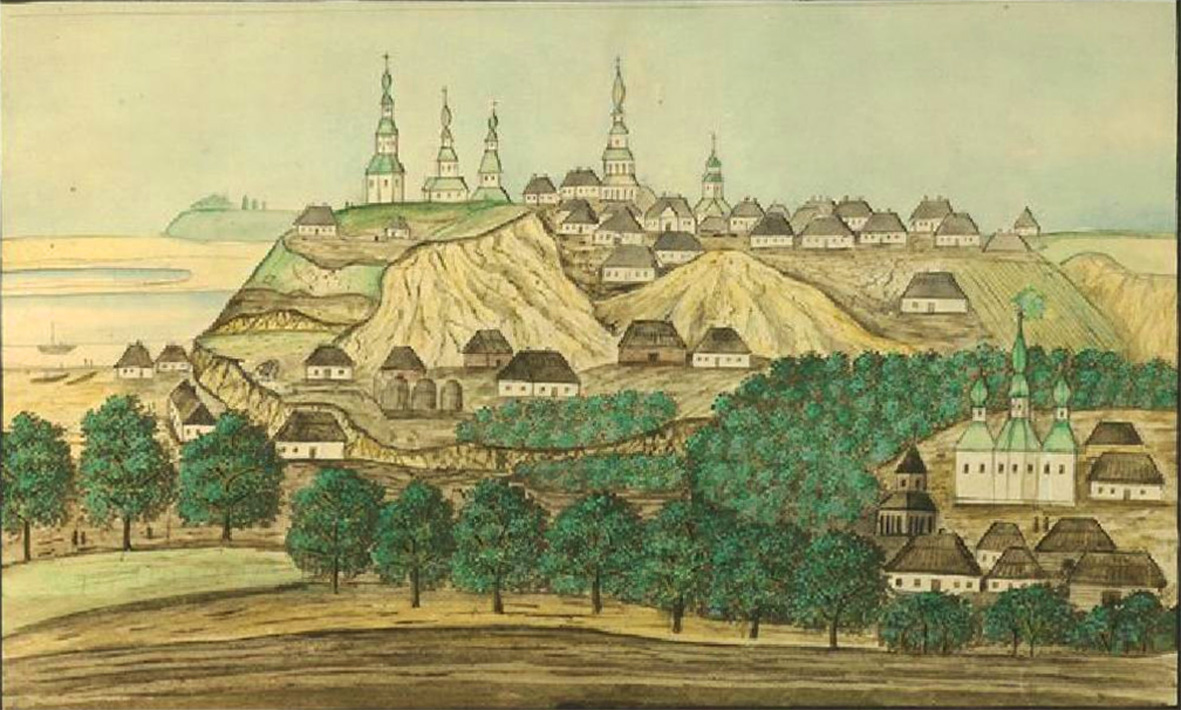 Трипілля. Домінік П'єр де ля Фліз. «Медико-топографічний опис... Київської округи...». Київ, 1854. - с. 530